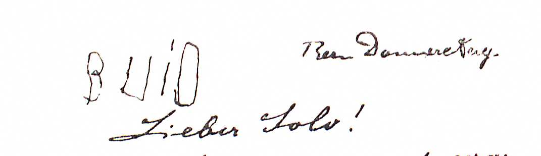 Albert Einsteins Brief an Maurice Solovine, Bern, 3. Dezember 1908, Anrede. Gescanntes Detail aus dem Brief.Text: Lieber Solo!BUID ist die Unterschrift des vierjährigen Hans Albert Einstein.Quelle: Lettres à Maurice Solovine, 1956, S. 10